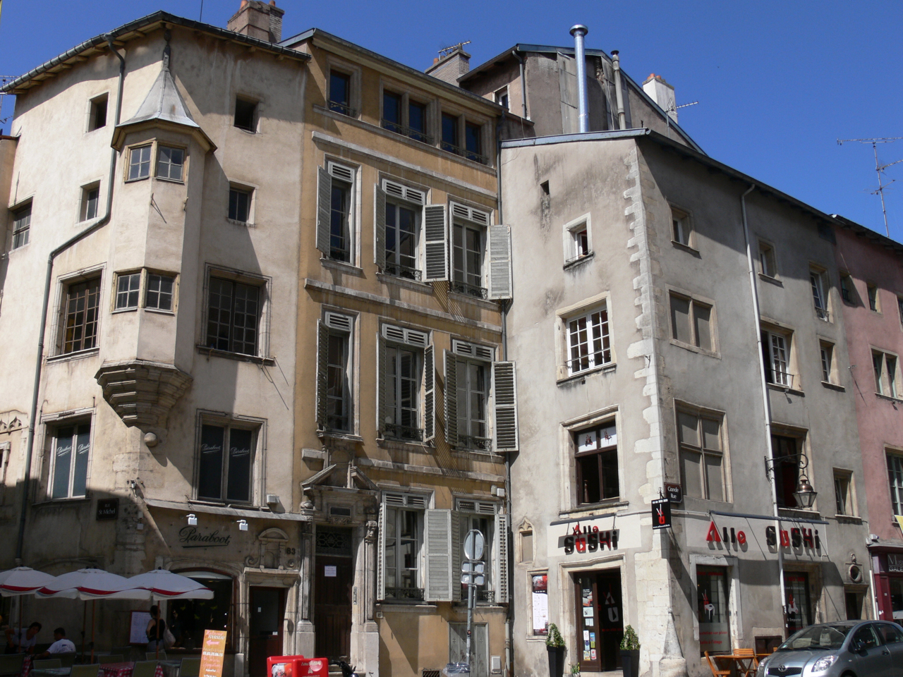 immeuble gothique et Renaissance à l'angle 2 rue Saint-Michel & 83 Grande-rue ainsi que immeubles Renaissance 85 & 87 Grande-rue, Nancy, Lorraine, France .